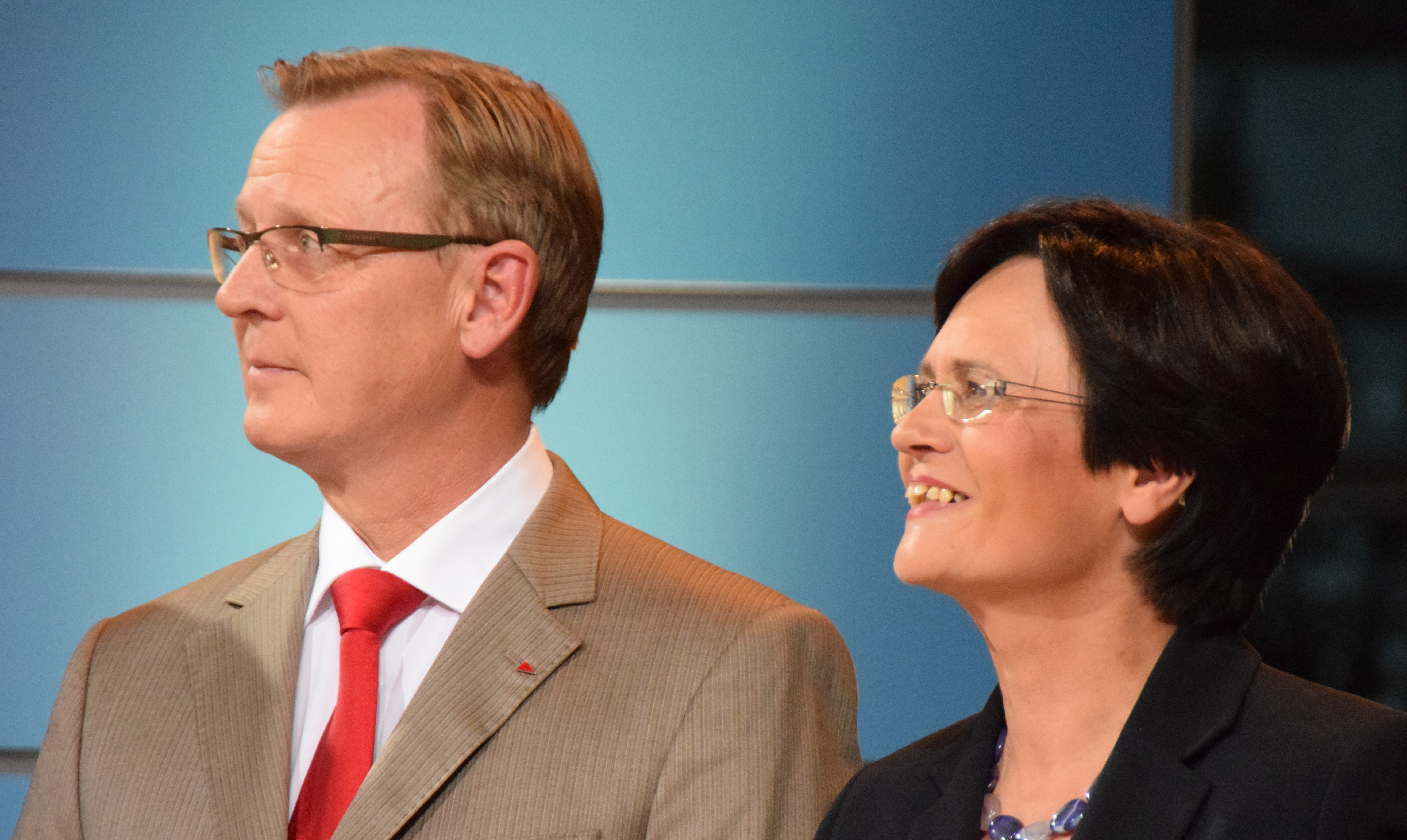 Landtagswahl Thüringen am 14. September 2014